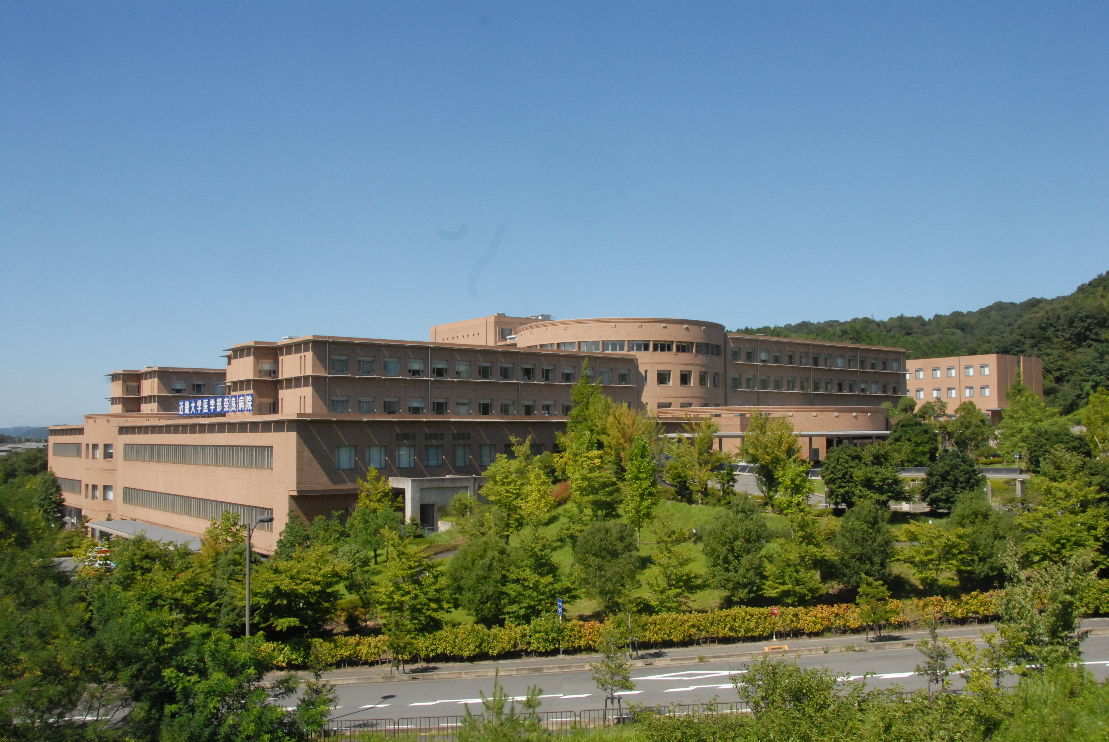 近畿大学医学部奈良病院の概観です。